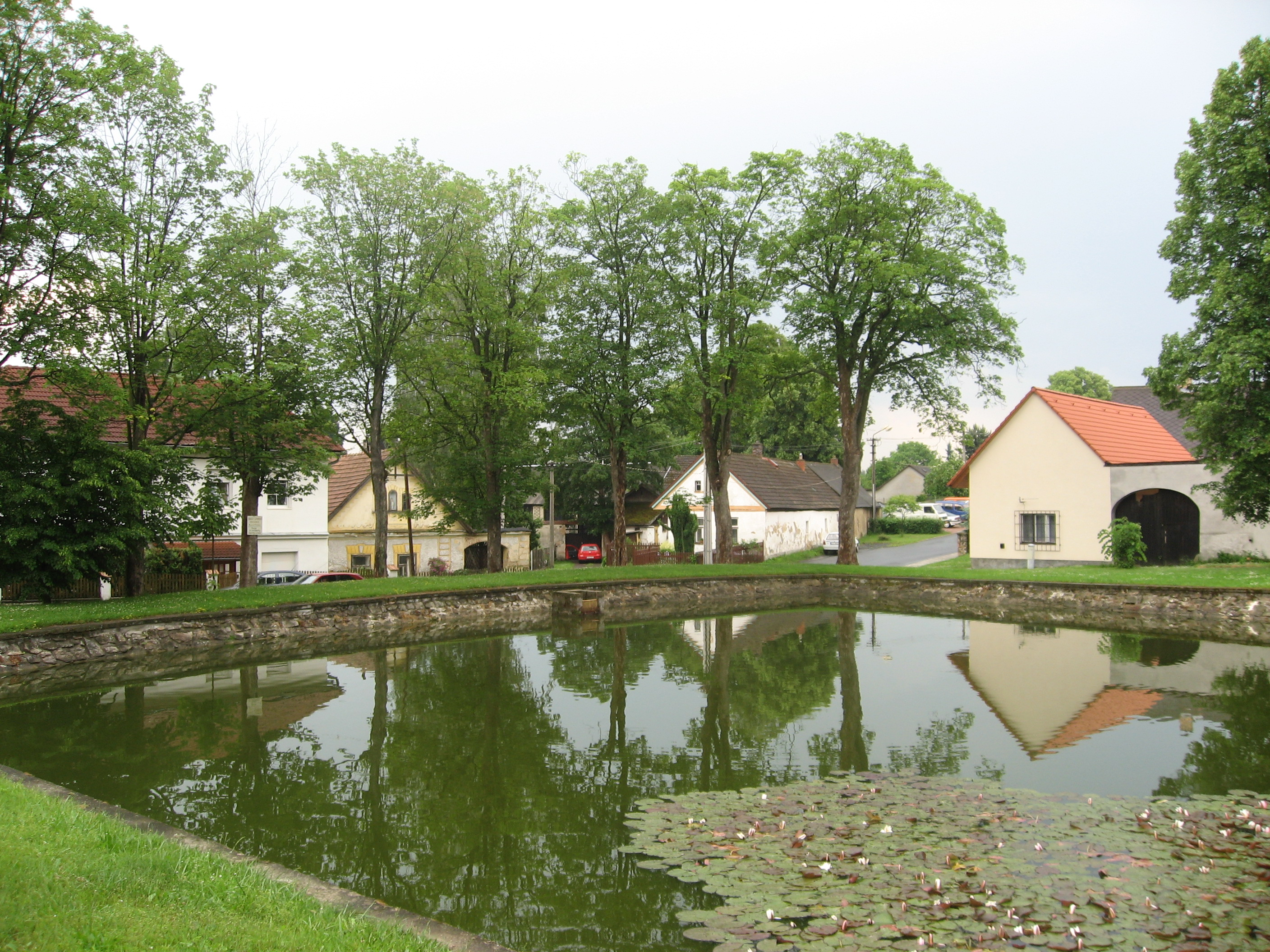 Jiřice, rybníček